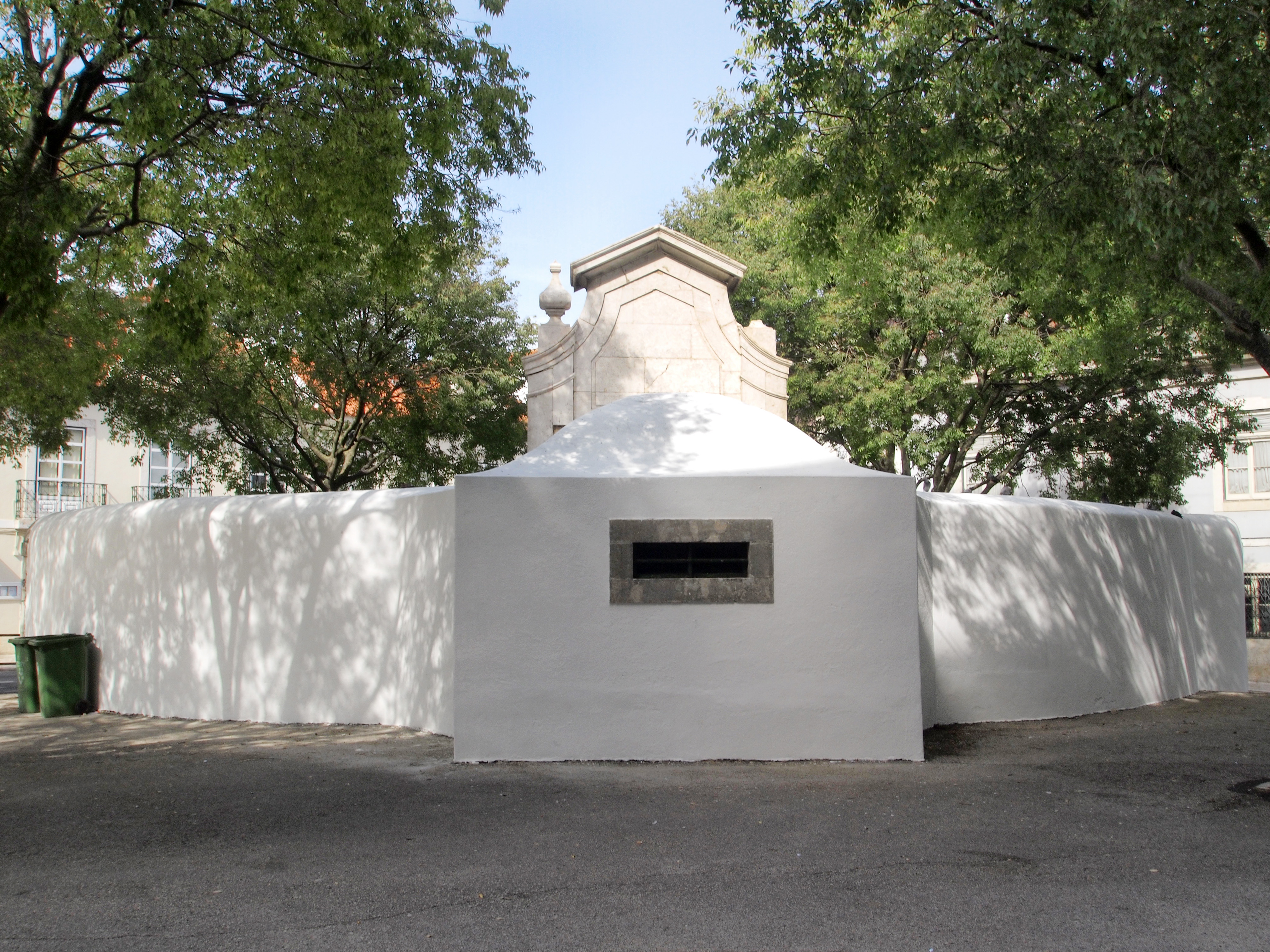 Chafariz de Benfica pintado e limpo em Agosto de 2011